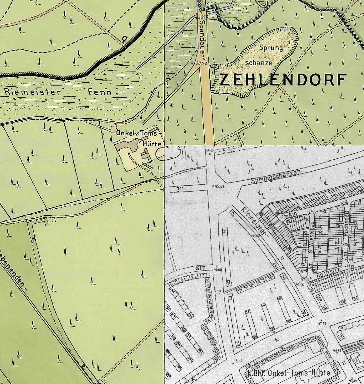 Das amtliche Kartenwerk “Stadtplan von Berlin” im Maßstab 1:4.000 wurde von den Bezirksvermessungsämtern nach personellem und organisatorischem Vermögen bearbeitet. Quelle für die einzelnen Blattschnitte: Landesarchiv Berlin, Histomap Berlin, Nach Aussage des Landesarchiv Berlin stehen die Daten aus der Histomap unter Opendata frei verfügbar, Quellennachweis erbeten. Die Zuordnung der einzelnen Ausschnitte erfolgt über den Dateinamen: erste vierstellige Nummer = Blattschnitt (s. extra Datei) zweite vierstellige Nummer = Jahr der Veröffentlichung lt. Histomap Die einzelnen Ausschnitte wurden als georeferenzierte TIFs gespeichert. Die Georeferenzierung erfolgte anhand von Referenzpunkten über OpenStreetMap und über die Blattübergreifenden Elemente, so dass die Blätter sich möglichst nahtlos aneinander reihen lassen. Dabei kommt es zu kleinen Verzerrungen und Ungenauigkeiten, die hinsichtlich einer Gesamtkarte von Berlin hingenommen wurden. Zusätzlich wurden die Bilder technisch per Grafiksoftware mit Bedacht optimiert, so daß eine bessere Darstellung erreicht wird. Maßstab: 1:4.000 Koordinatenbezugssystem (KBS): WGS84/Pseudo-Mercator Kombination aus drei Karten: links: 1930 rechts oben: 1928 rechts unten: 1934